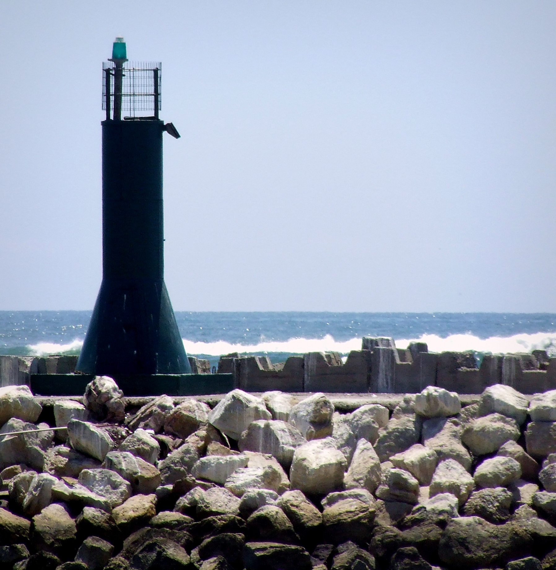 Molo y muelle de la ex Compañía de Salitre de Antofagasta This is a photo of a national monument in Chile: 312